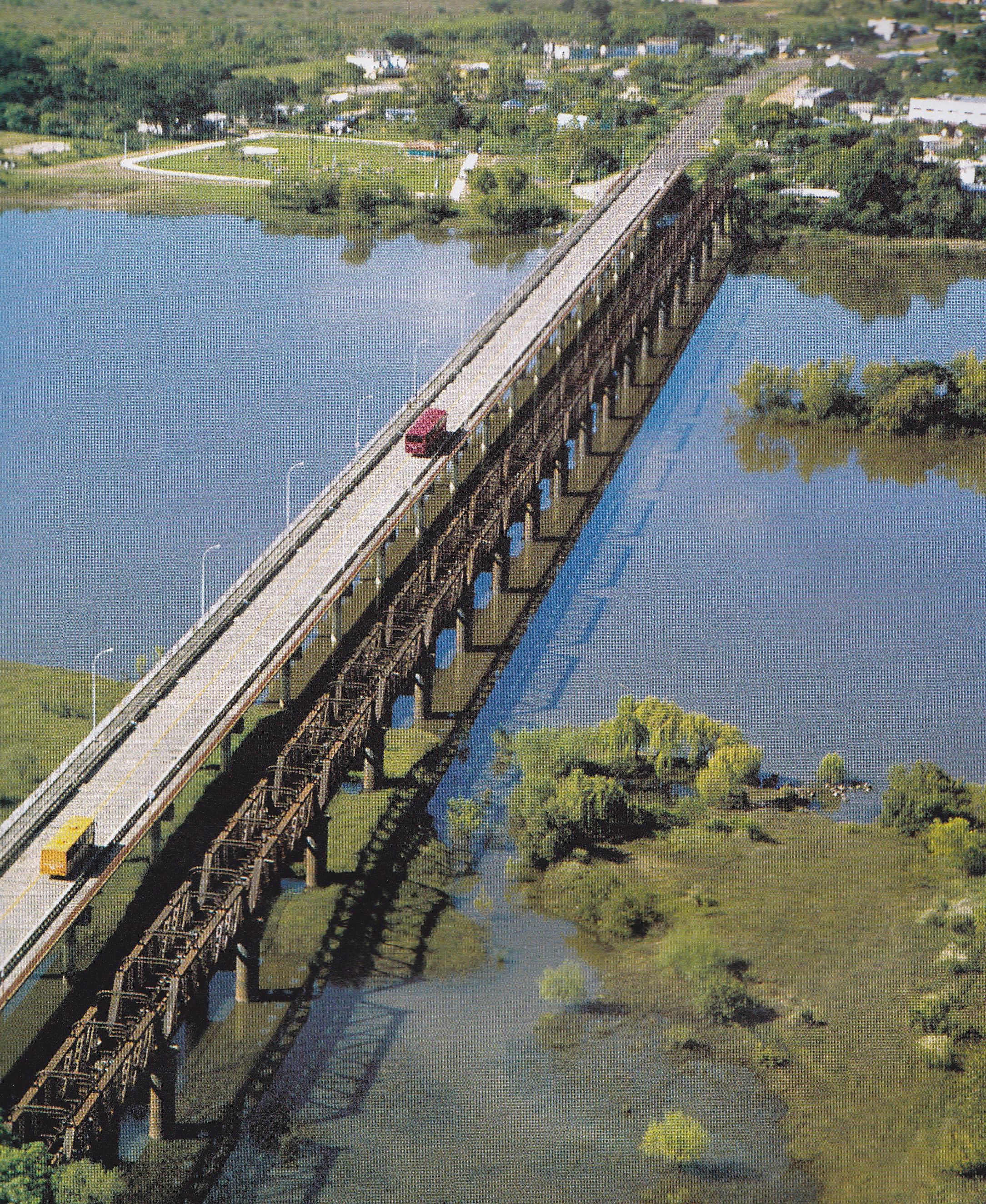 Puente Bella Union Barra Quarai